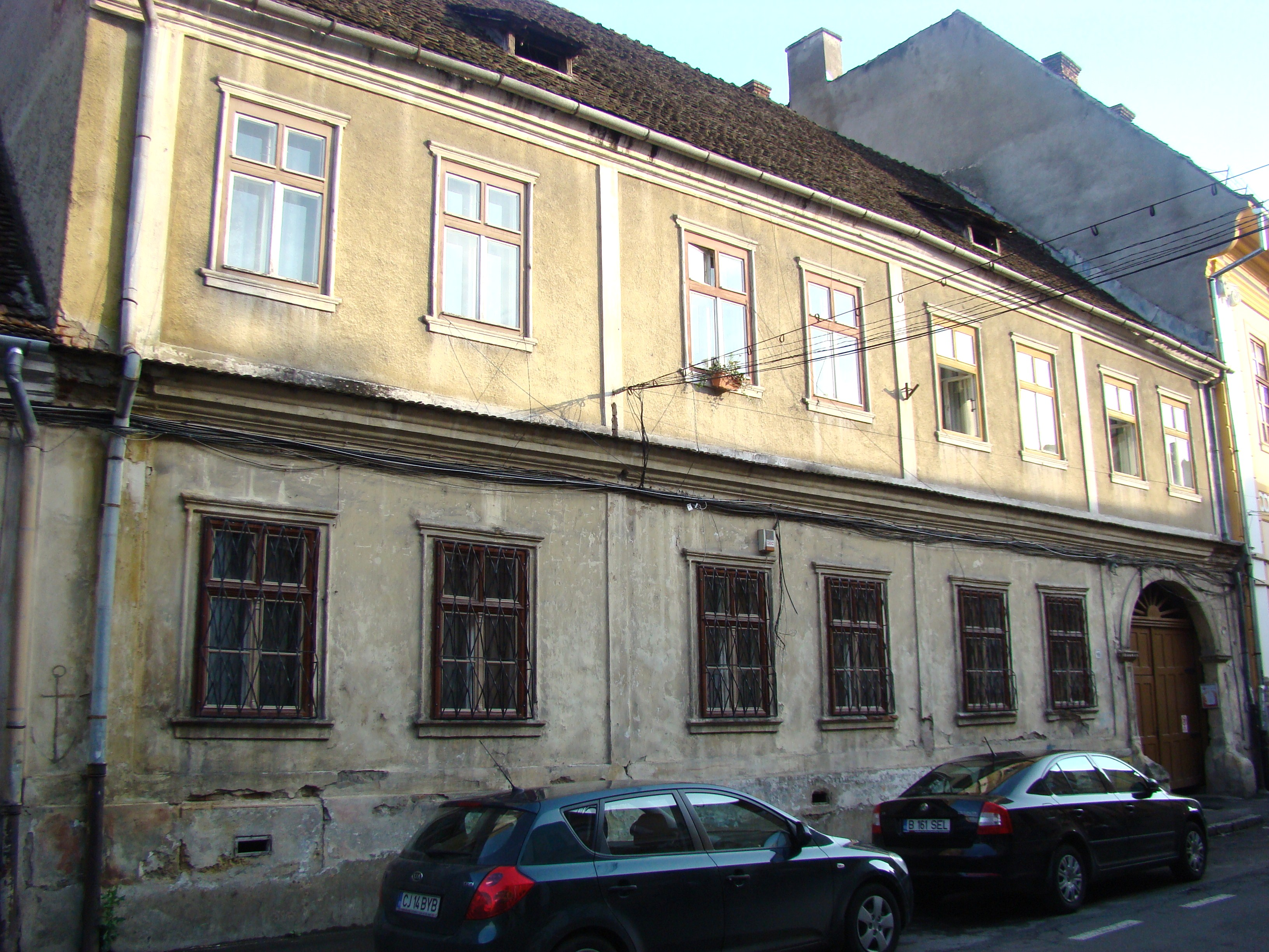 Casă monument strada I.C.Brătianu nr.16